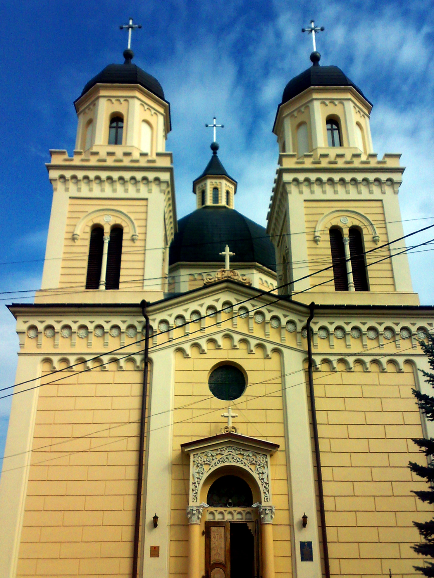 Церква Святої Параскеви Сербської УПЦ КП (Чернівці)